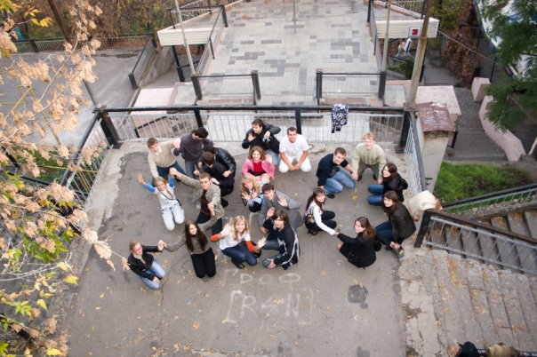 Международный день климатический действий. Таганрог, Ростовская область, Россия. 24 октября 2009 года.